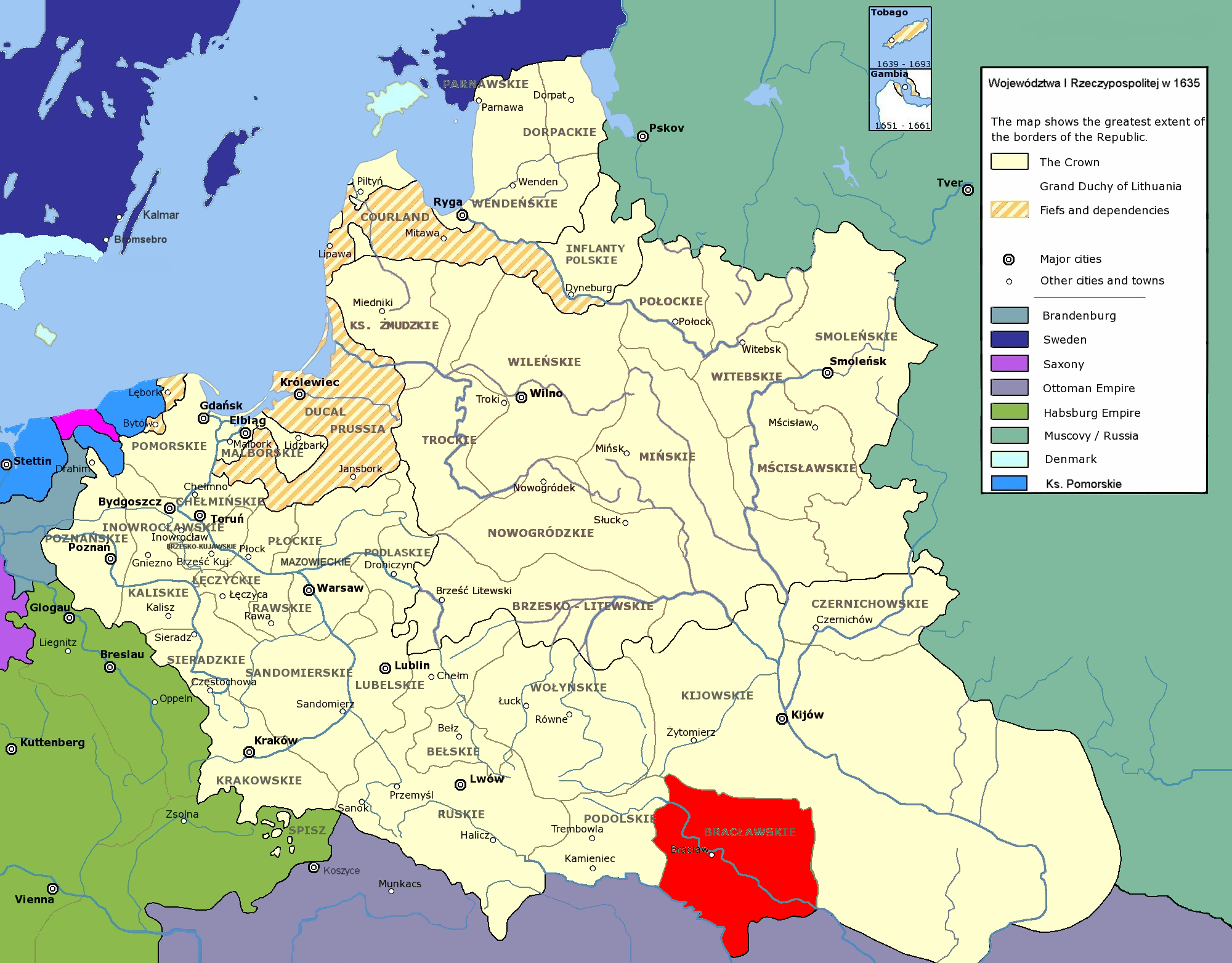 Rzeczpospolita Obojga Narodów w 1635 r.; województwo bracławskie Polish-Lithuanian Commonwealth in 1635; Bracław Voivodeship